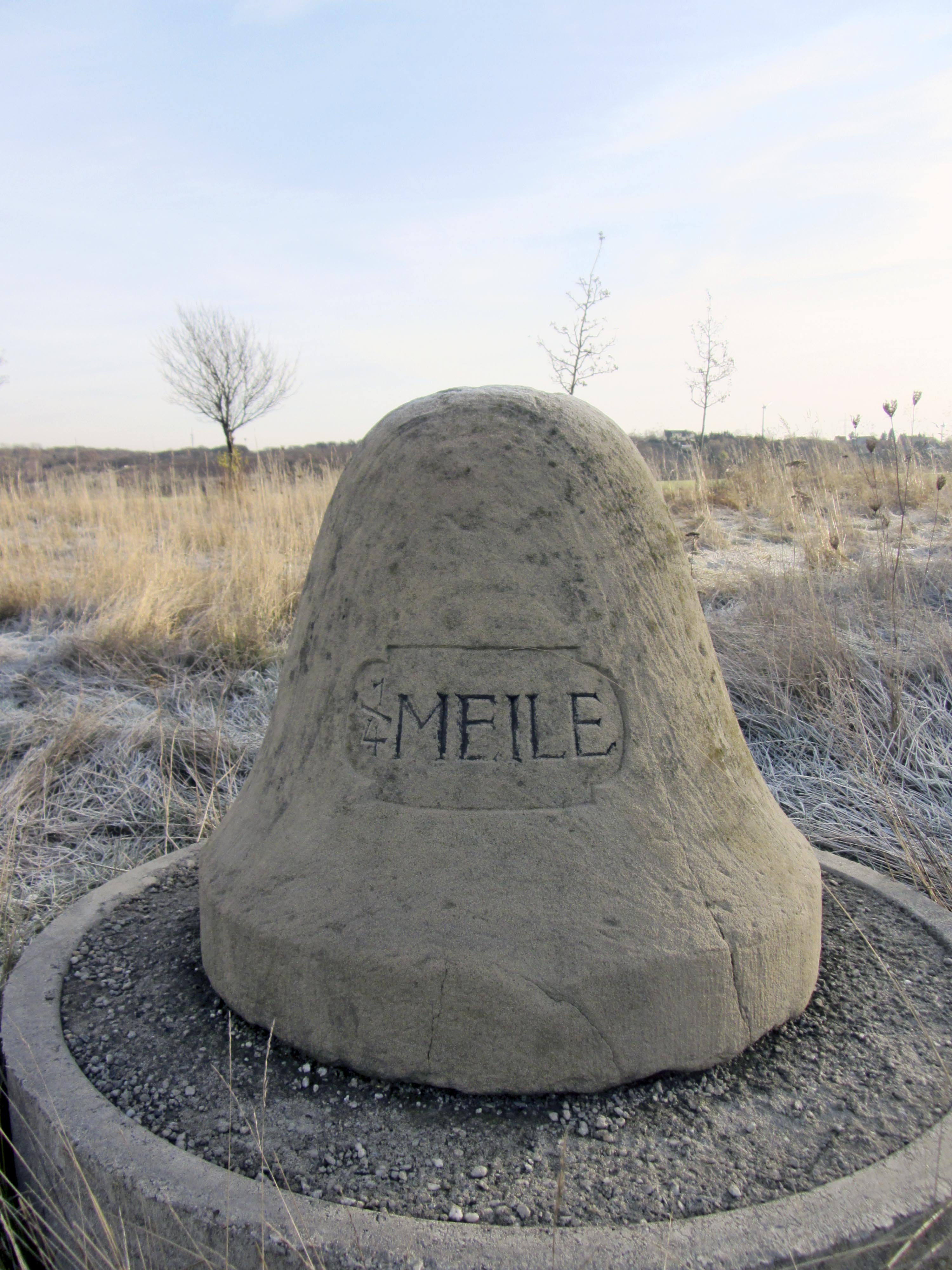 Preußischer Viertelmeilenstein an der B 2 Höhe Bergisdorf (Kuhndorf)